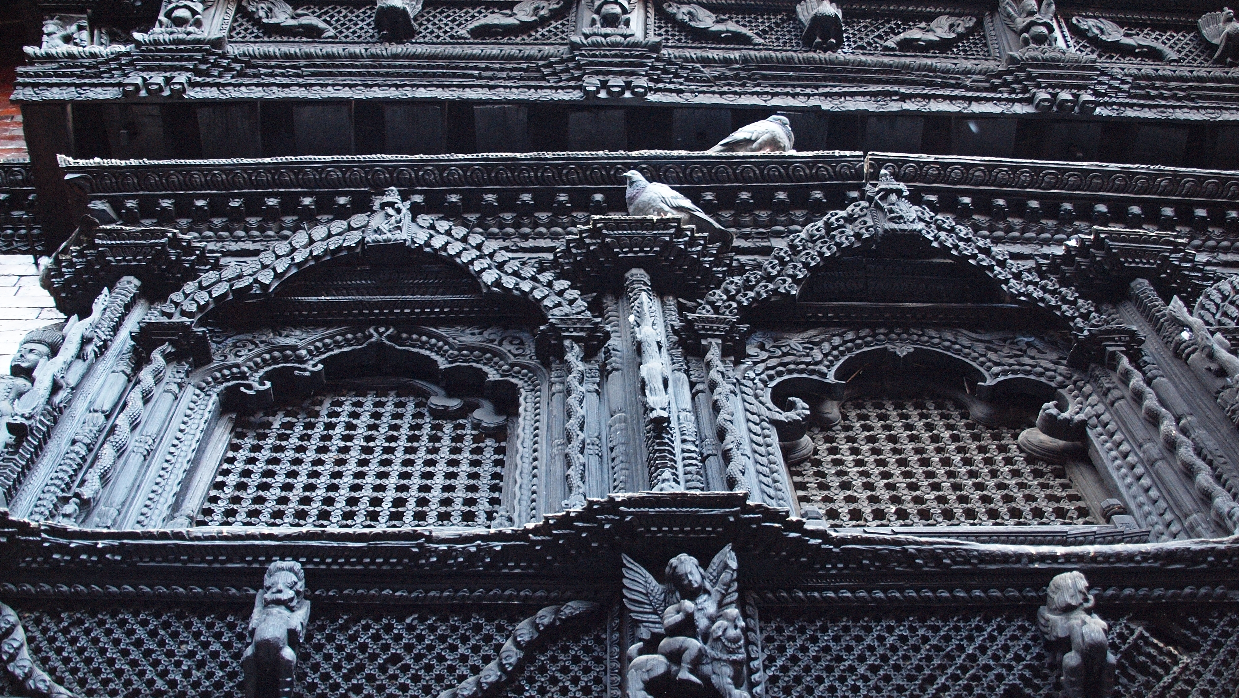 Nepal, Kathmandu, Durbar-Platz, Tempel-Palast der Kumari, Detailansicht